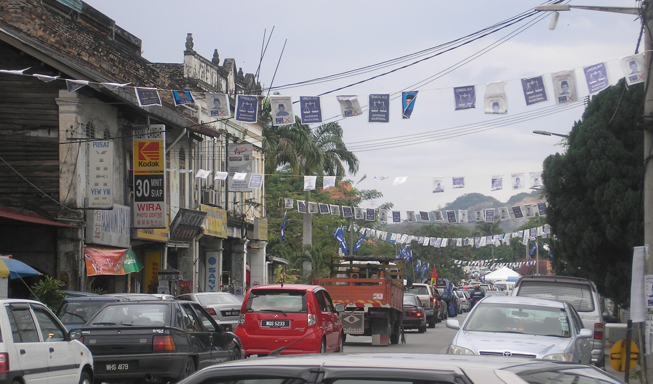 Campaign banners of the 2008 Malaysian general election in Semenyih (N24 Semenyih), Selangor, Malaysia.